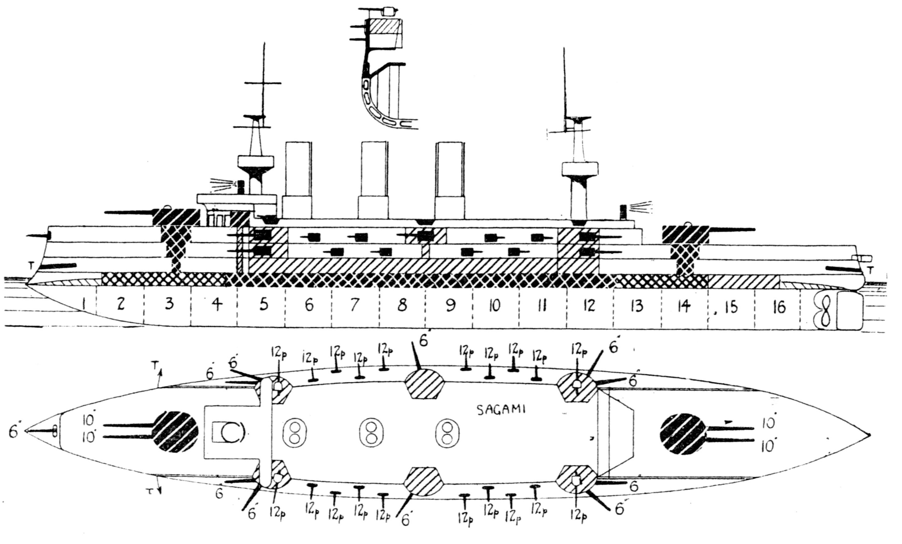 ロシアの戦艦「ペレスヴェート」、日本の戦艦「相模」